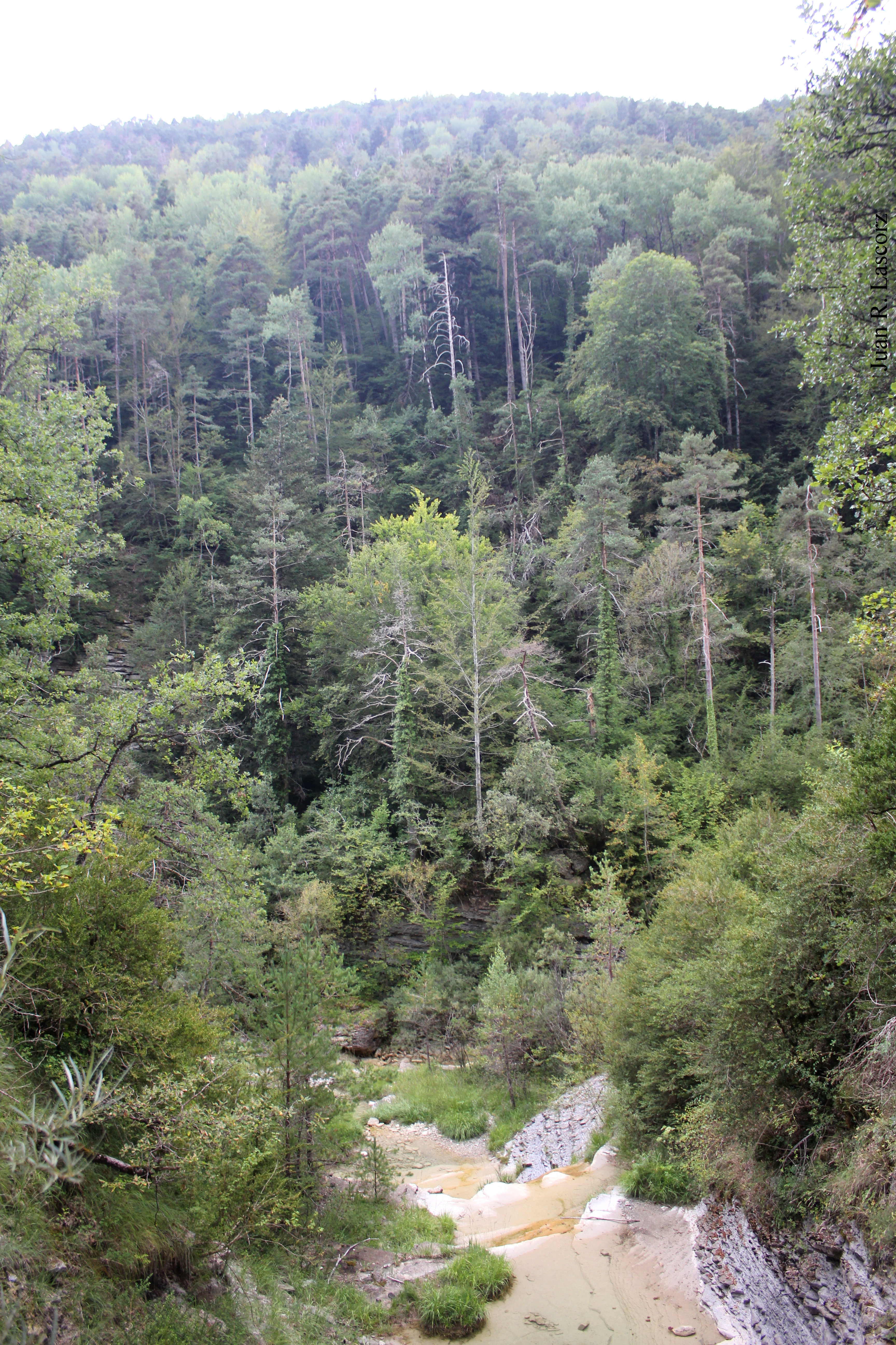 Aragonés: O paco de Bergua dende o camín d'Escartín ta Ayerbe, en Sobrepuerto.